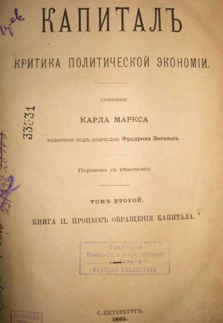 Карл Маркс, «Капитал», т. 2, титульный лист